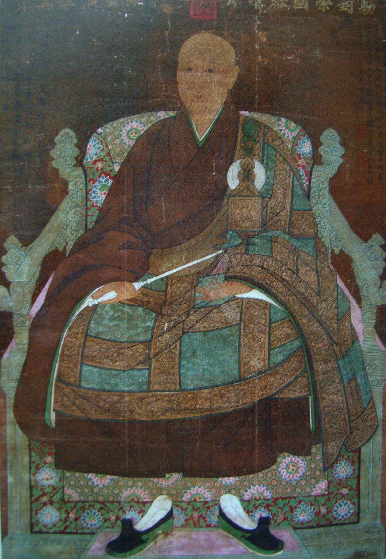 姚廣孝（1335年－1418年），法名道衍，字斯道，江浙等處行中書省平江路長洲縣（今江蘇蘇州）人。元末明初政治家，明成祖朱棣自燕王時代起的謀士、靖難之役的主要策劃者。